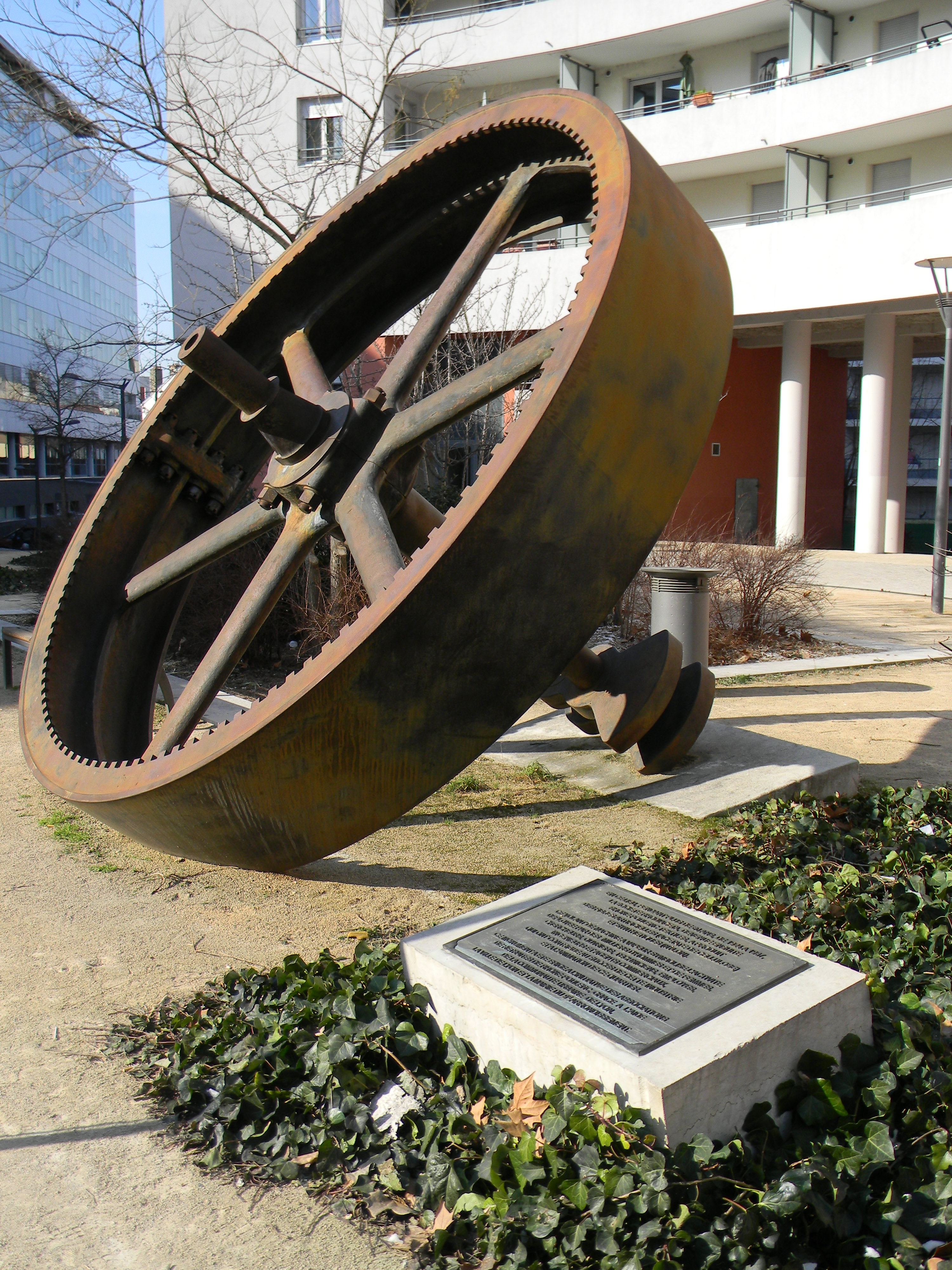 Volant de machine à vapeur symbolisant l'activité de 1924 à 1987 dans le quartier de millier d'employés de la société Rhodiaceta, devenue par la suite Rhône-Poulenc.